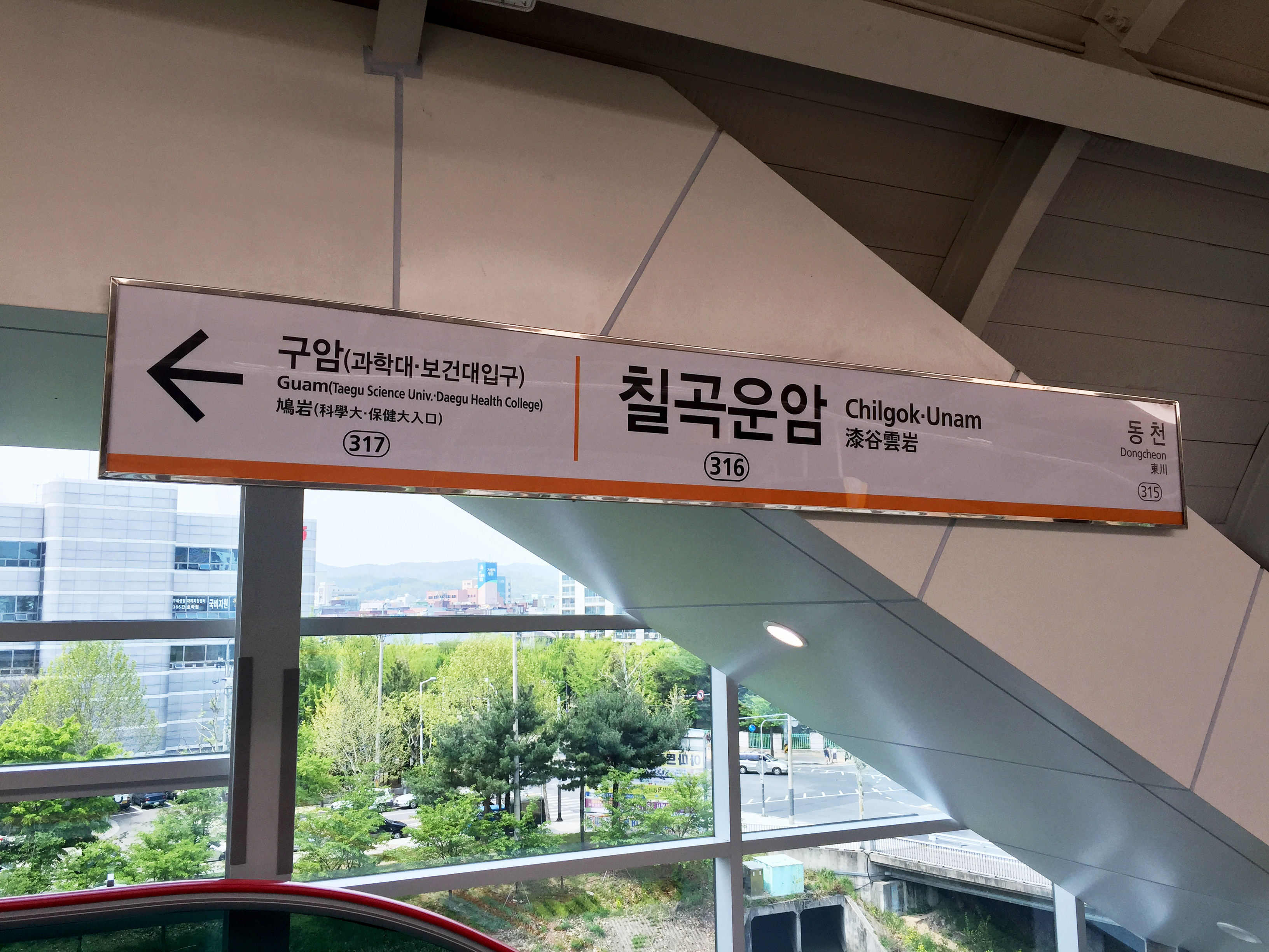 칠곡운암역 역명판